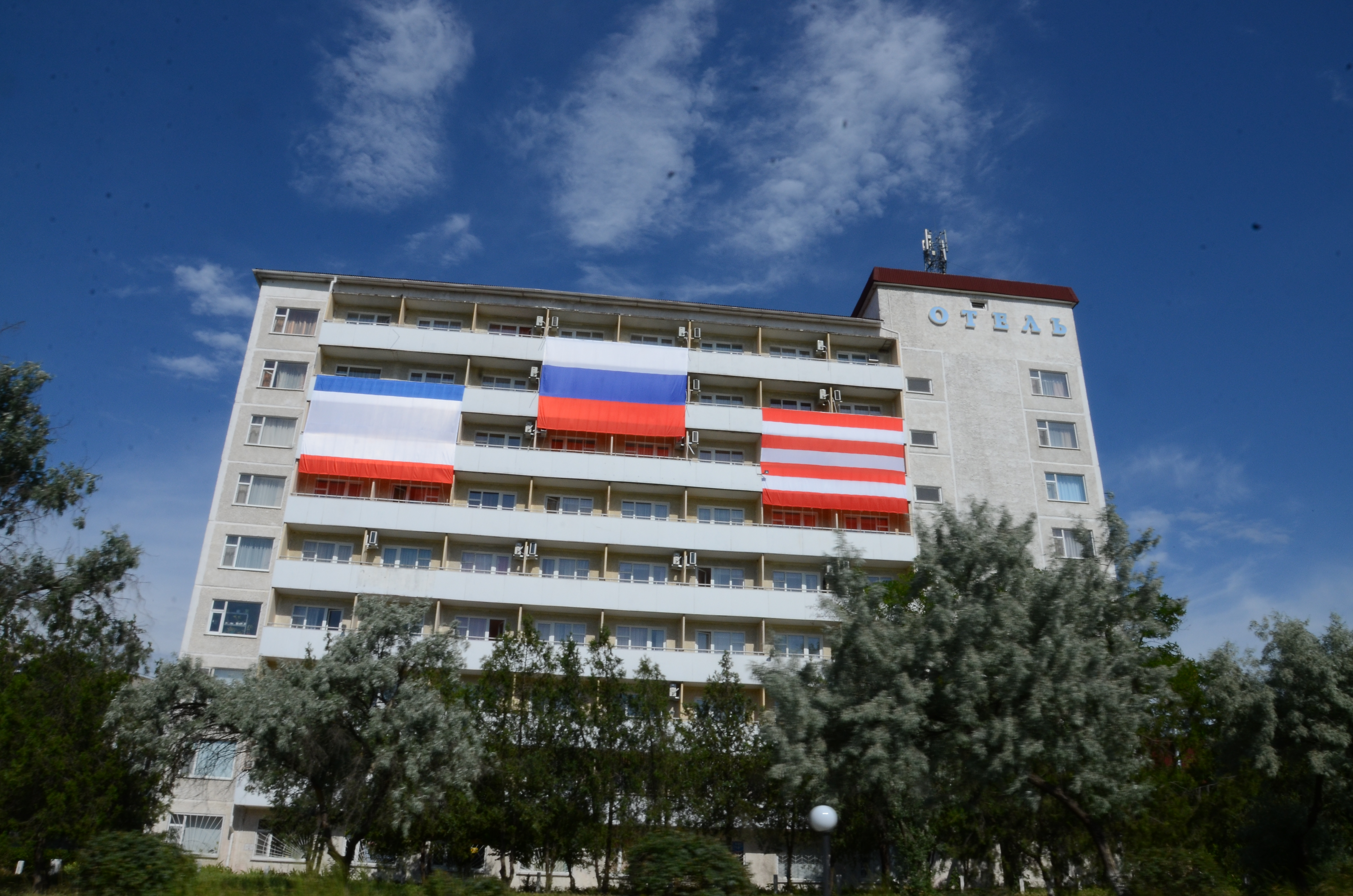 Керчь